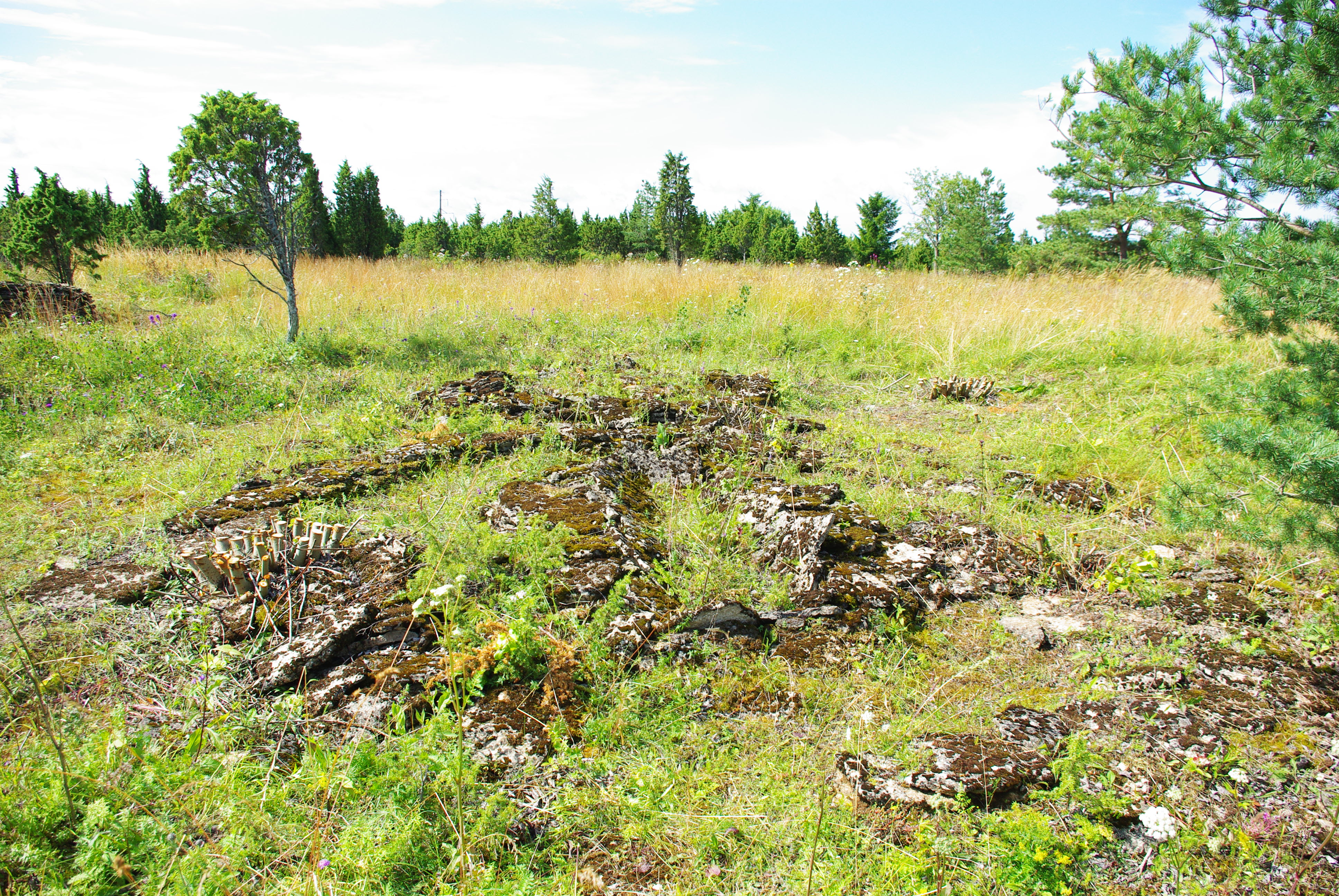 Kivikirstkalmed